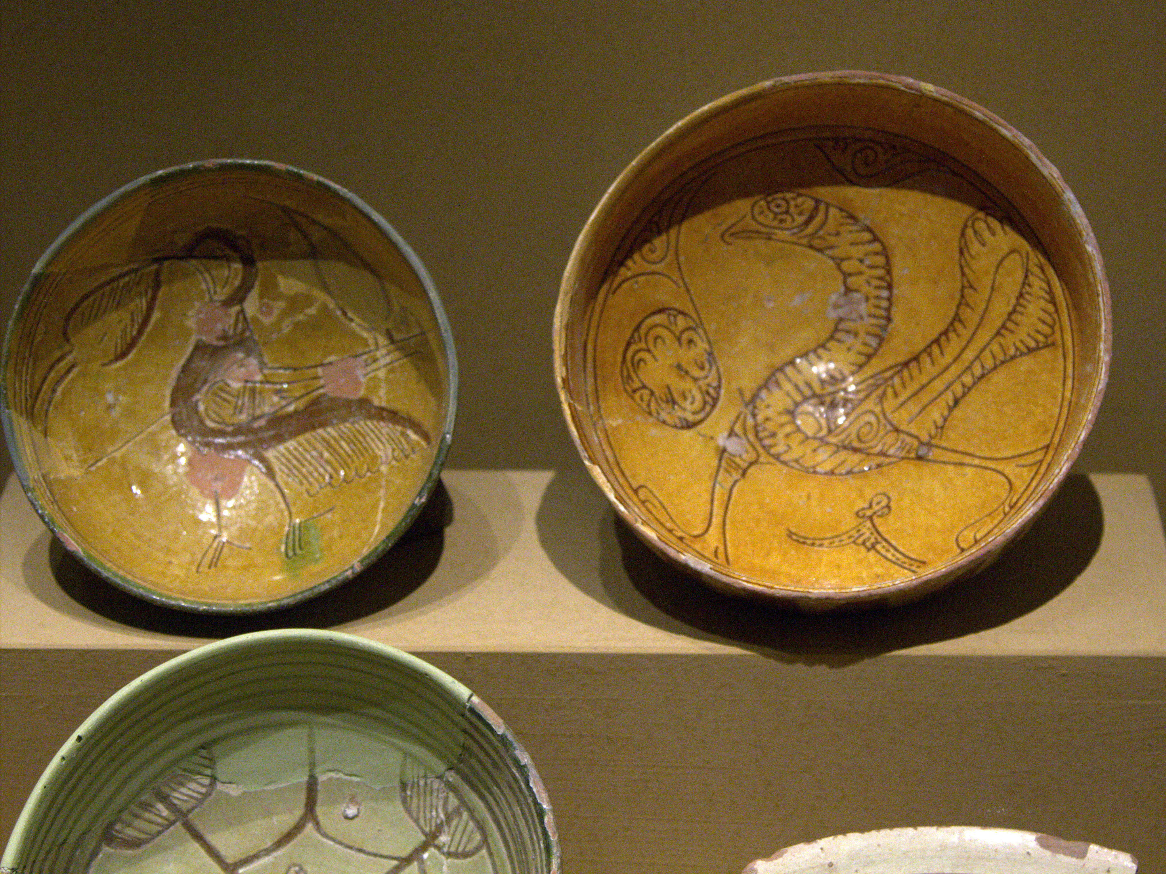 Museum of Byzantine Culture, Thessaloniki, Greece. --- Εφυαλωμένα κεραμικά με εγχάρακτη και γραπρή διακόσμηση, 12ου - 16ου αι. Μουσείο Βυζαντινού Πολιτισμού, Θεσσαλονίκη.